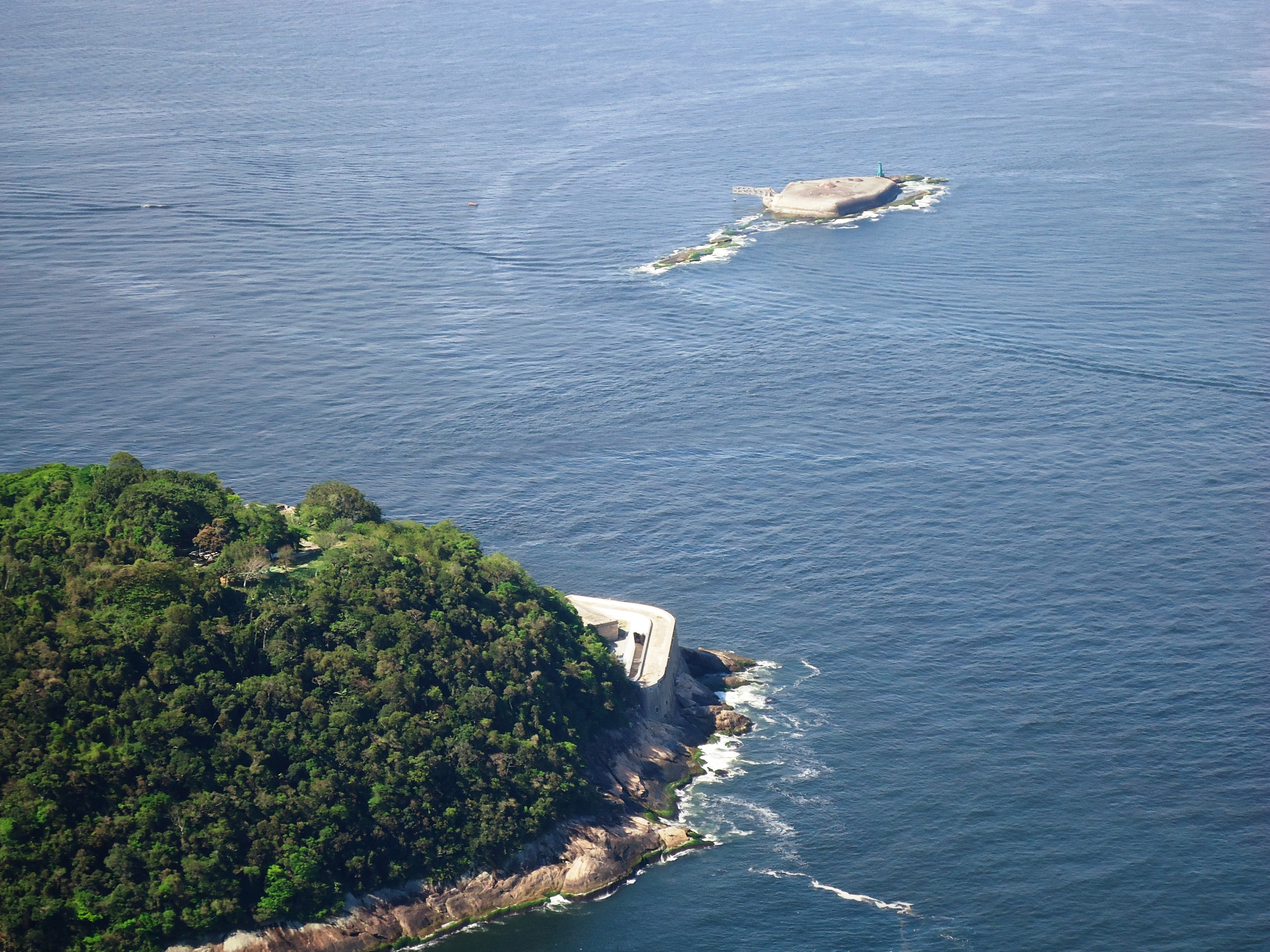 Fortaleza de São João e Forte Tamandaré da Laje, baía de Guanabara, cidade e estado do Rio de Janeiro, Brasil: vista a partir do morro do Pão de Açúcar.